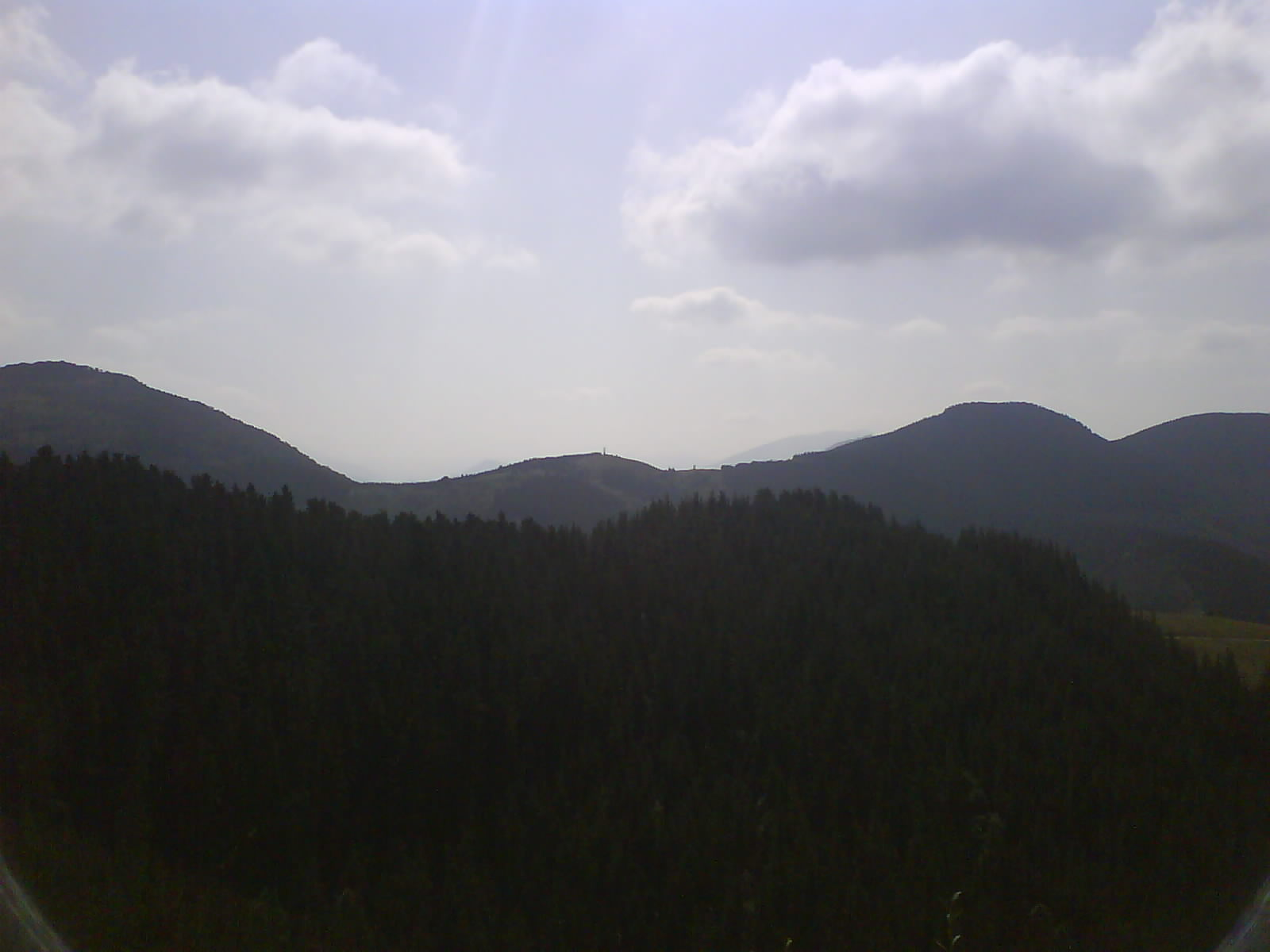 Besaide. País Vasco España